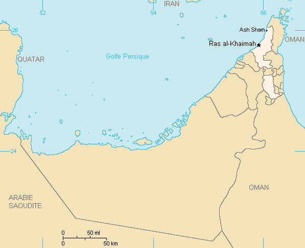 Description:Carte de l'émirat de Ras al-Khaimah,Emirats arabes unis Auteur:Rémih